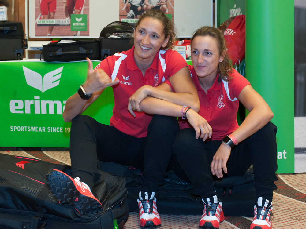 Einkleidung der Österreichischen Teilnehmer an den Olympischen Sommerspielen 2016 am 16./17. Juli 2016 in Wien. Bild zeigt Lara Vadlau und Jolanta Oglar.